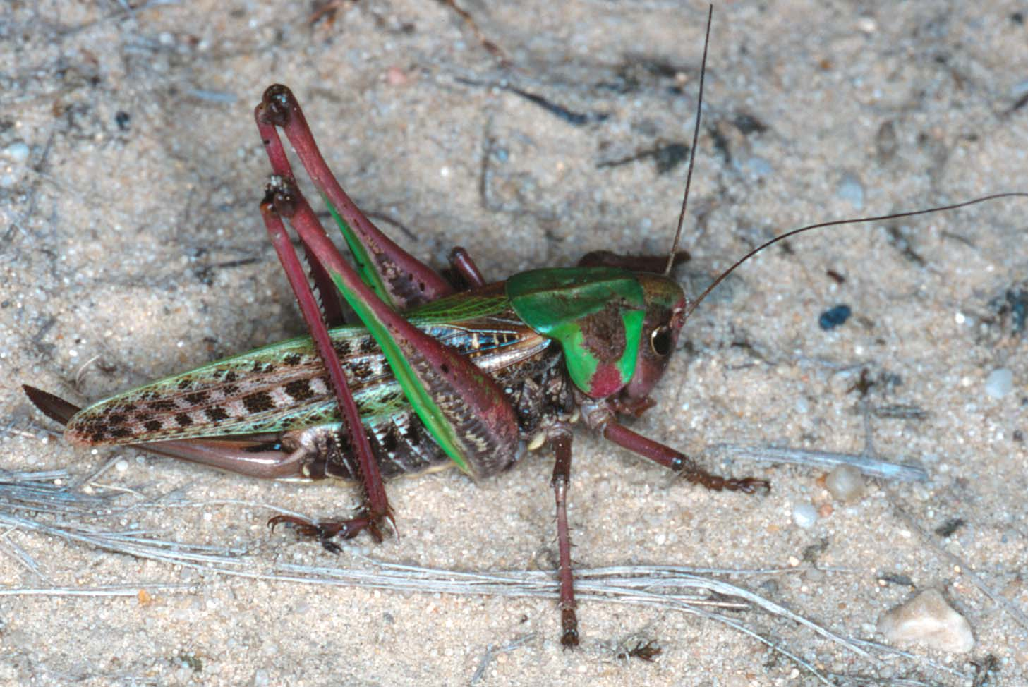 Warzenbeißer (Decticus verrucivorus f.) im NSG Königsbrücker Heide (Sachsen), Randbereich